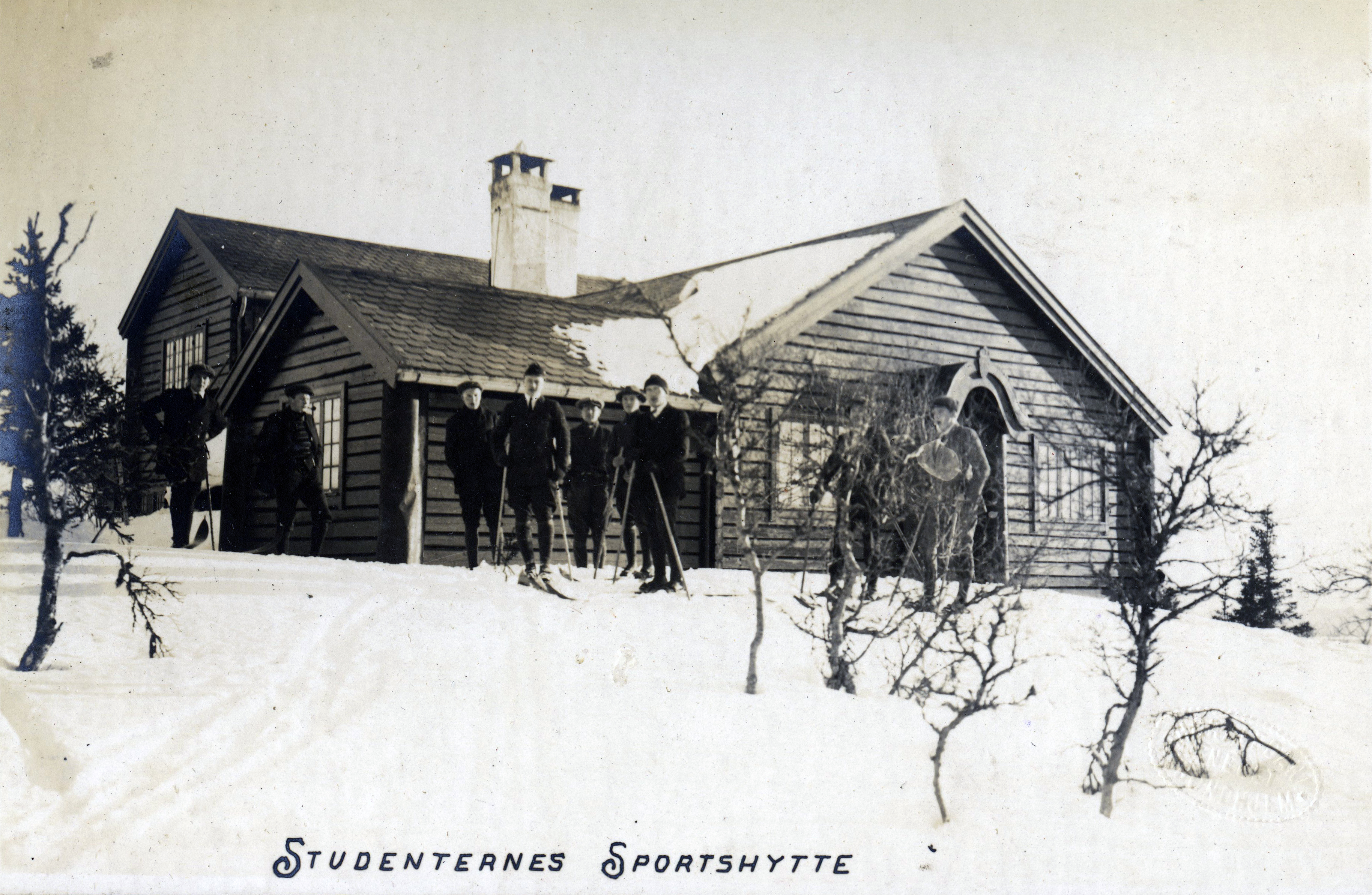 Format: Postkort. År: Tidlig 1900-tall, ca. 1910 - 1915. Fotograf: Thoralf Dahl